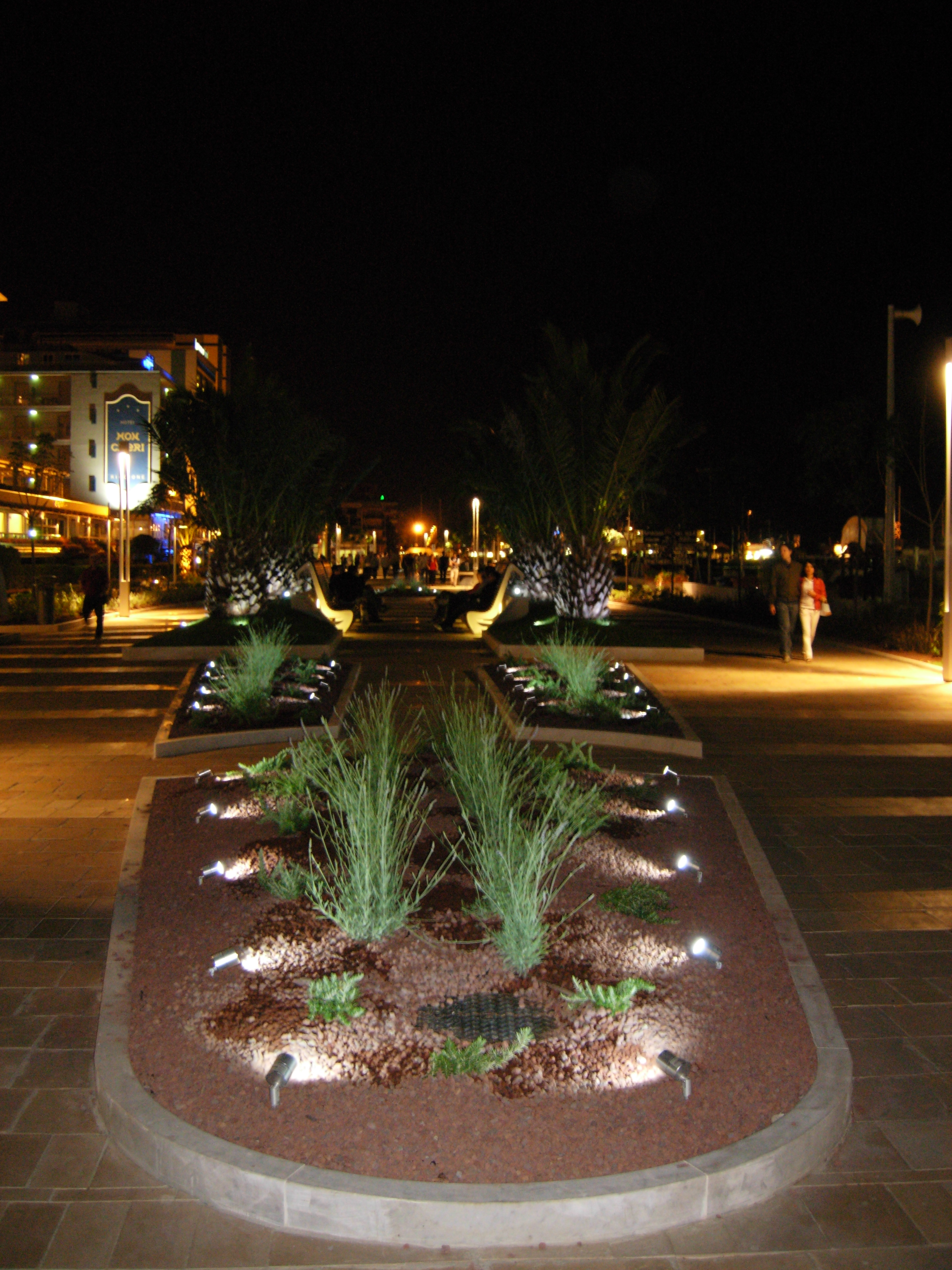 Lungomare di Riccione